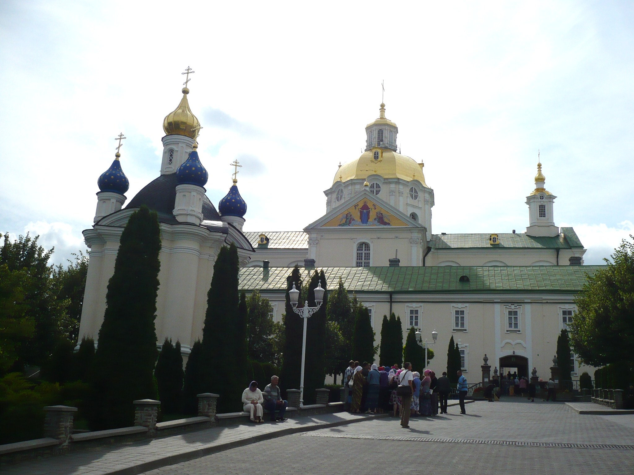 Ławra Poczajowska